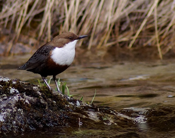 Pluszcz C. c. aquaticus Tatry